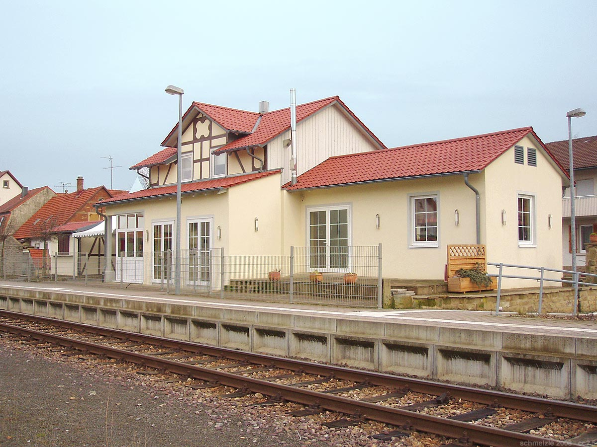 Alter Bahnhof in Siegelsbach